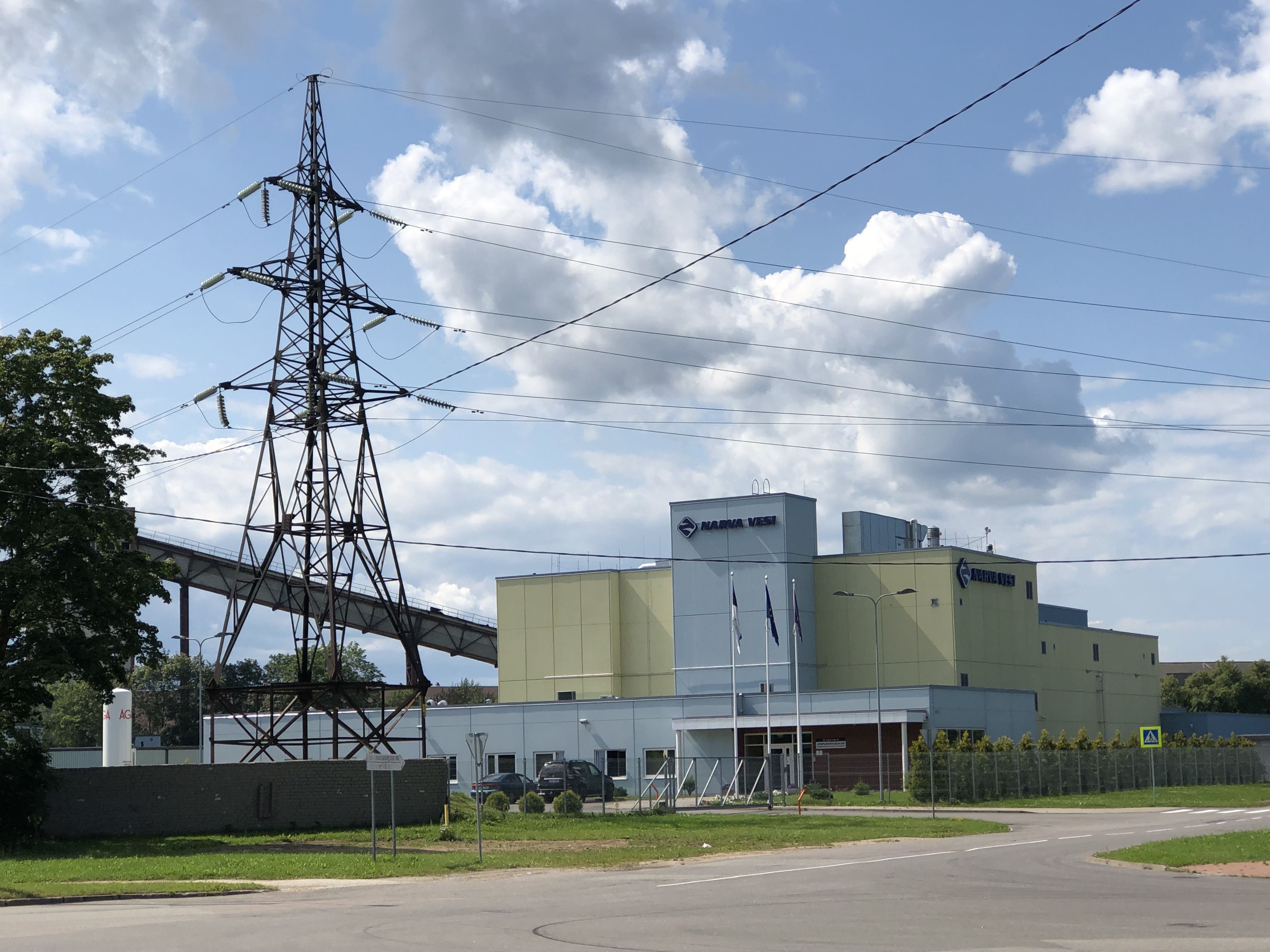 Narva Vesi peahoone at Kulgu 4, Narva